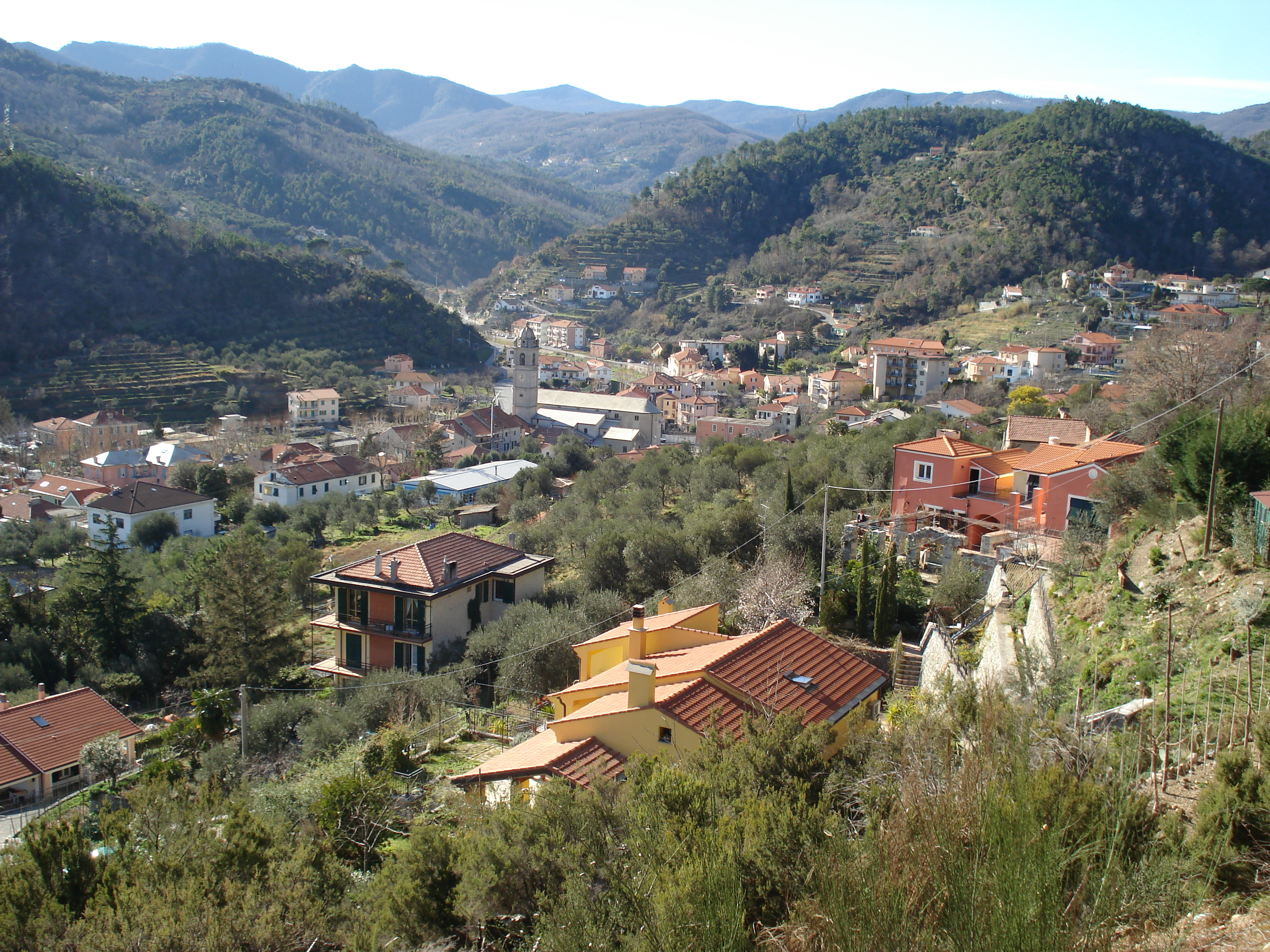 Cosmin latan,07-02-2008,Quiliano